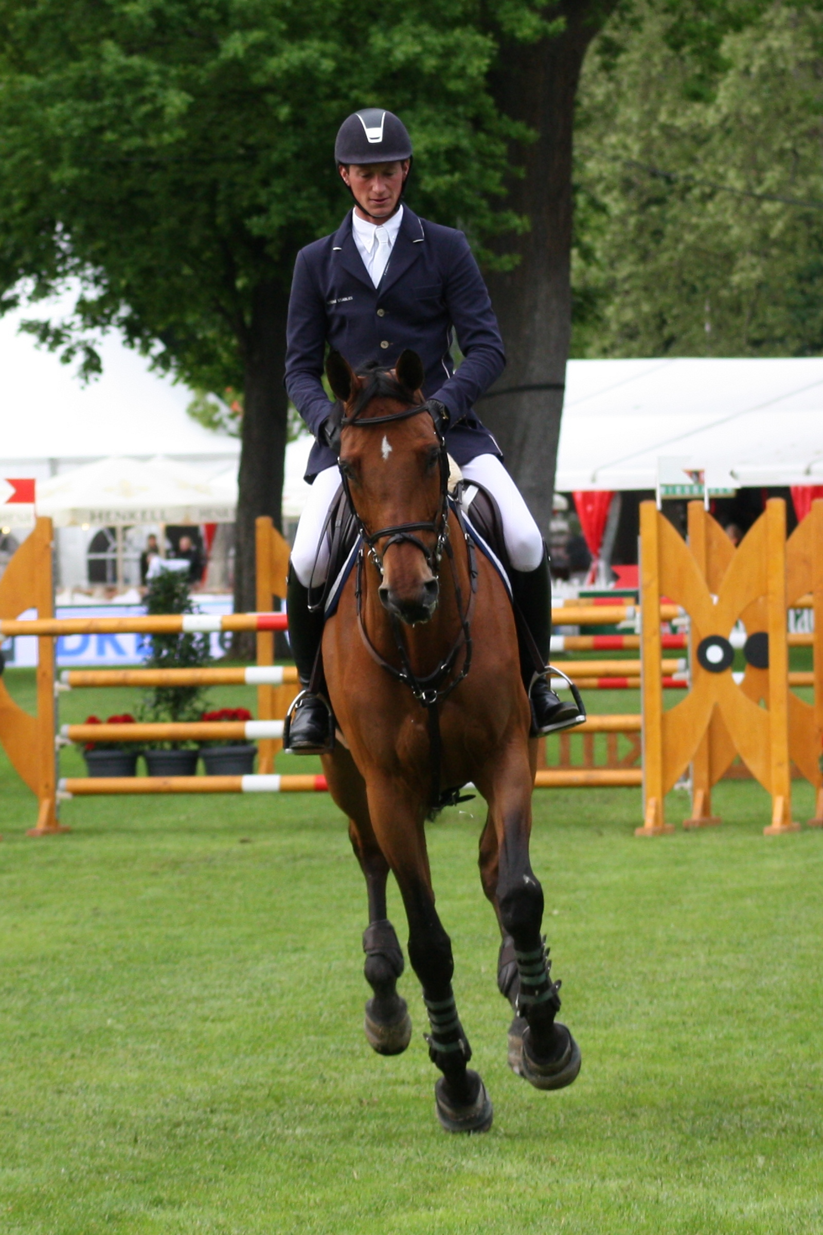 77. Internationanles Wiesbadener Pfingstunier 2013, CSI***** Eröffnungsspringen, Daniel Deußer auf Evita van de Veldbalie Personality rights warning Although this work is freely licensed or in the public domain, the person(s) shown may have rights that legally restrict certain re-uses unless those depicted consent to such uses. In these cases, a model release or other evidence of consent could protect you from infringement claims.